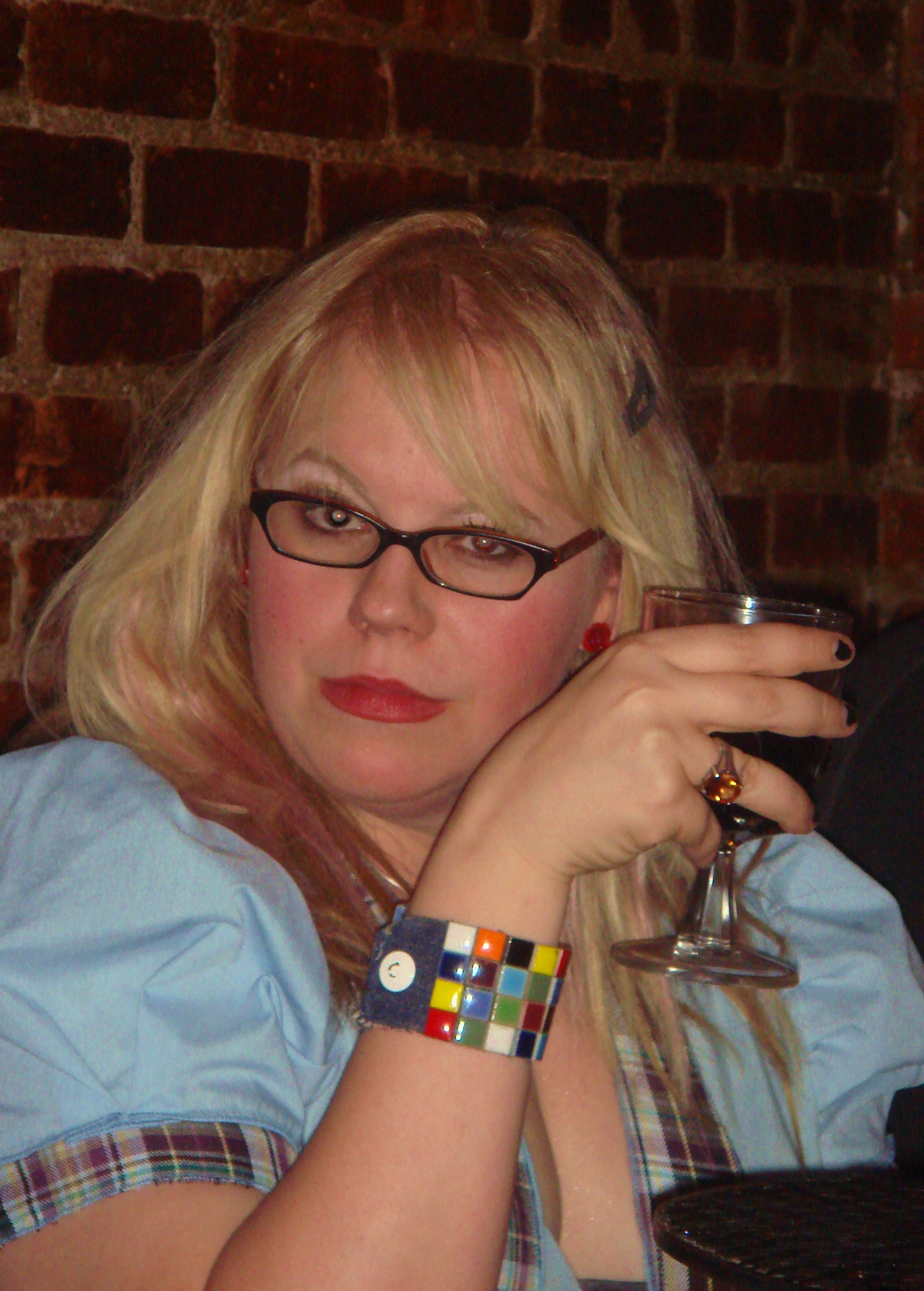 Kirsten Vangsness on November 10, 2007